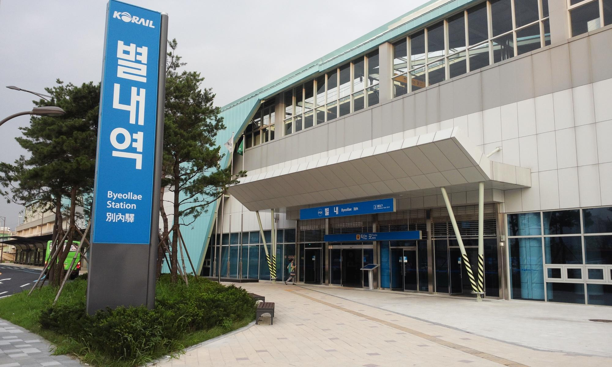 별내역2번출입구